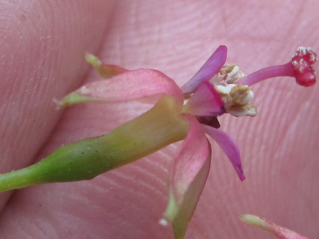 lycioides hermafrodita, la flor de esta fuchsia es super variable en su forma.